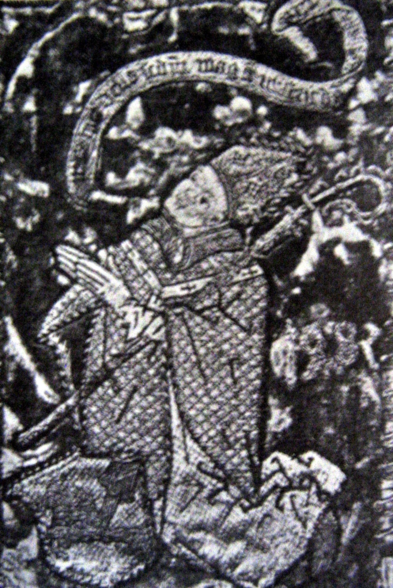 Broderi på mässhake från 1400-talet, möjligen av Albertus Pictor. Föreställer ärkebiskop Jakob Ulvsson.